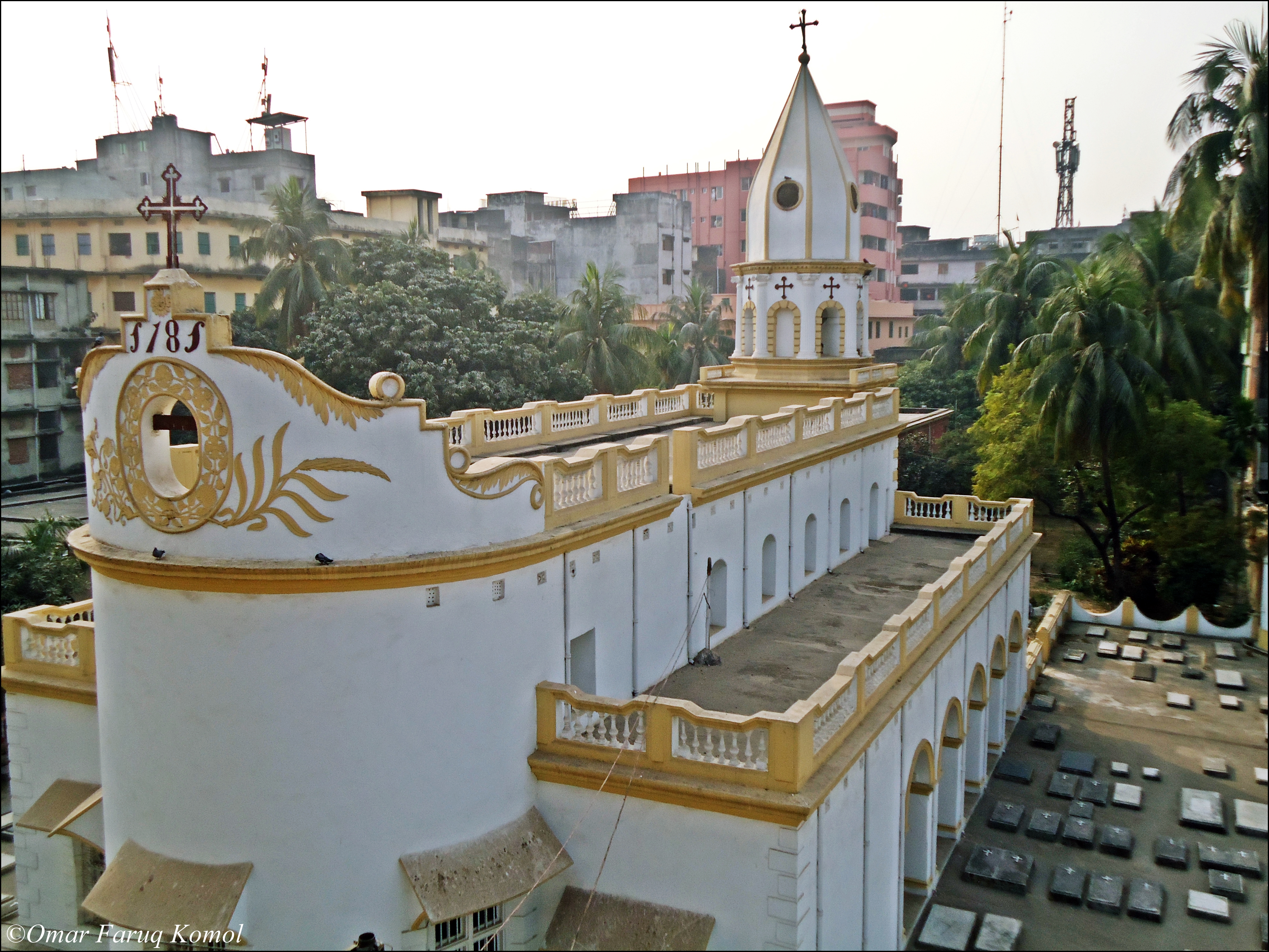 এই গির্জা ঢাকার প্রাচীন নিদর্শনগুলোর মধ্যে অন্যতম।